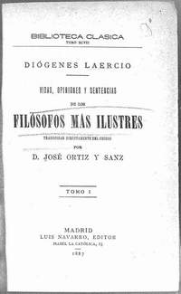 Portada de la primera edición de "Vidas de Filósofos Ilustres" por Jose Ortiz y Sanz